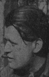 Arkitekten Svend Bögh-Andersen